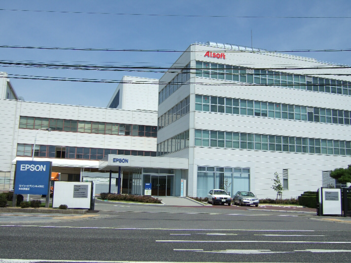 セイコーエプソン 松本事業所。エー・アイ・ソフト本社であったときに撮影。長野県松本市 Seiko Epson Corporation Matsumoto office in Matsumoto, Nagano, Japan